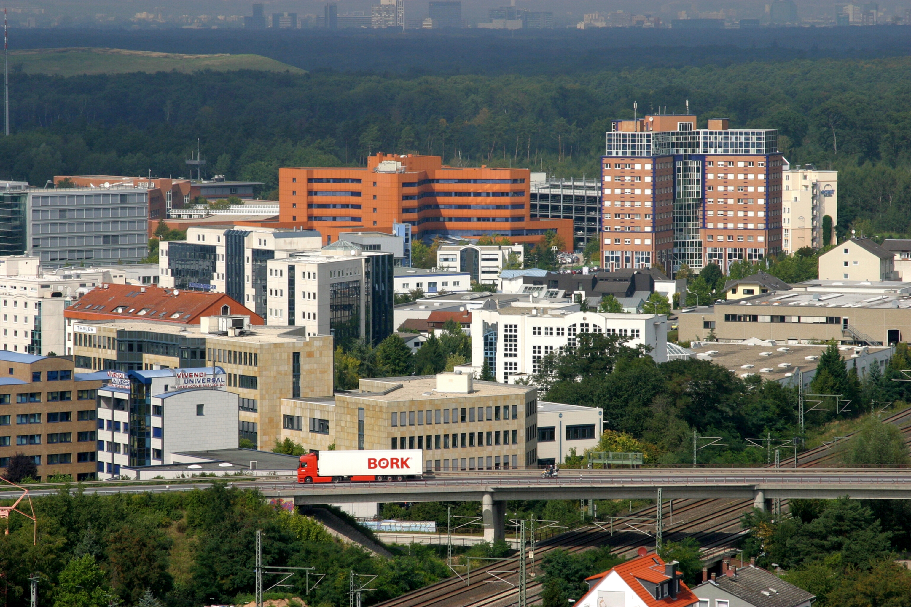 Wirtschaftszentrum Neurott in Langen (Hessen)